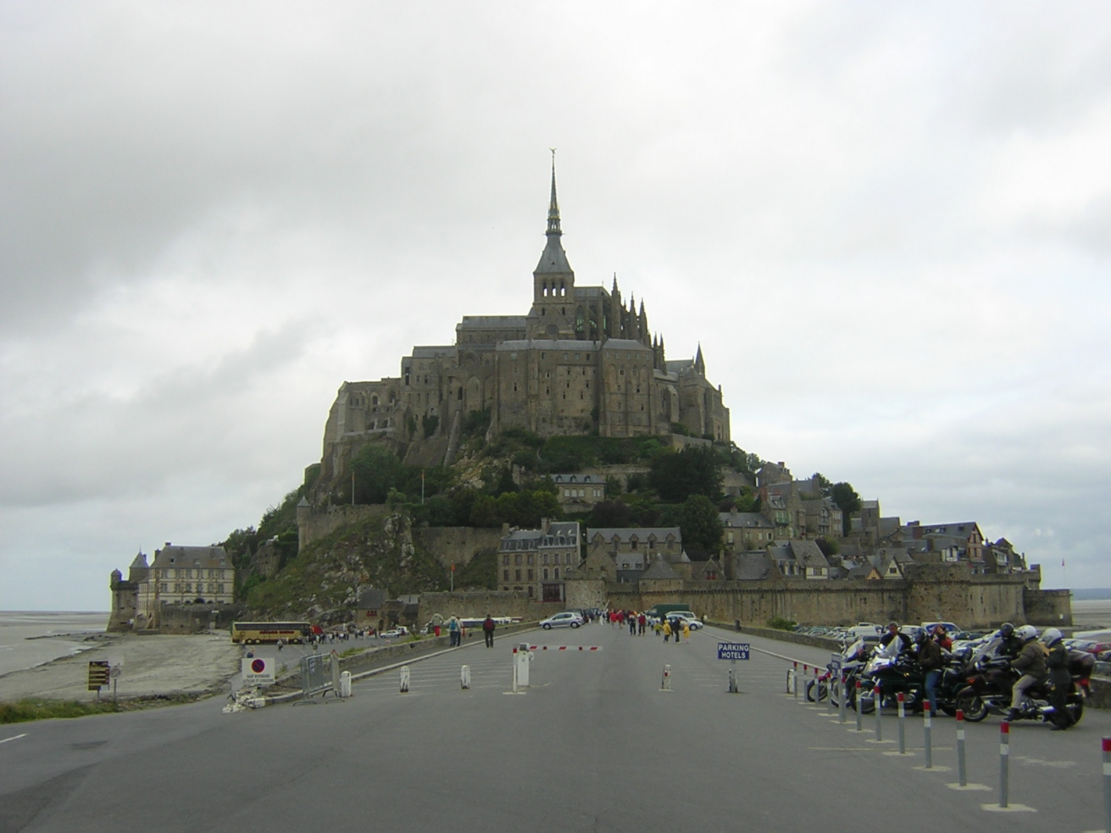 Mont Saint Michele